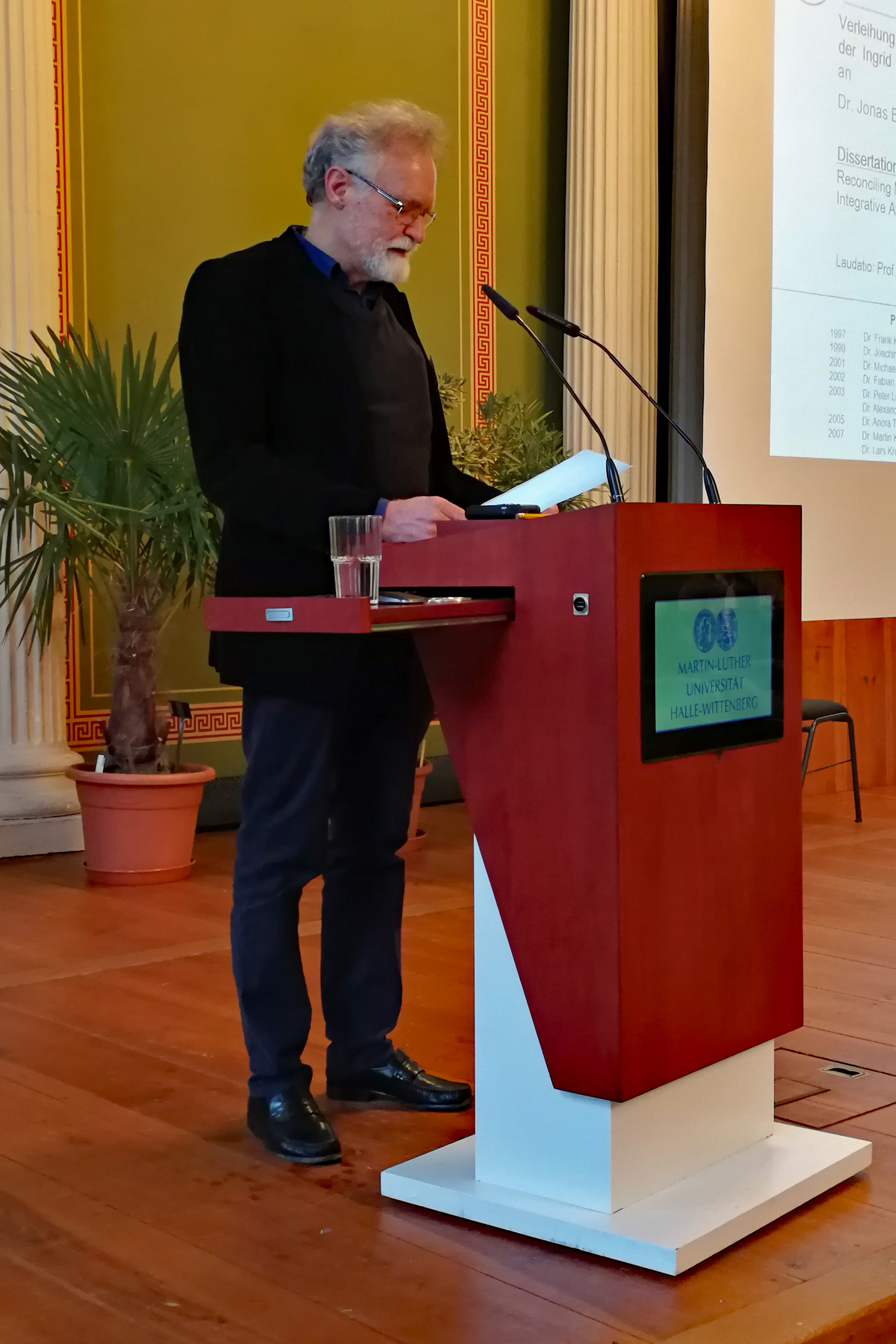 Entomologentagung der Deutschen Gesellschaft für allgemeine und angewandte Entomologie 2019 in Halle an der Saale (Wolfgang Wägele)